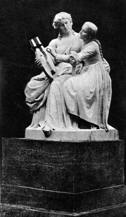 Die Skulptur von Louis Sussmann-Hellborn (1828–1908)- Das deutsche Volkslied – im Großer Tiergarten, südlicher Rand, nahe der Hofjägerallee, Ecke Stülerstraße, wurde im Original 1910 aufgestellt. Durch Vandalismus sehr stark beschädigt wurde sie abgebaut und in den Sockel des Denkmals für die Befreiungskriege auf dem Kreuzberg (Sockel des Kreuzbergdenkmals, Depot der Denkmalpflege u. a.) gebracht. 1993 fertigte der Berliner Bildhauer Hans Starcke eine Kopie der Figurengruppe an.